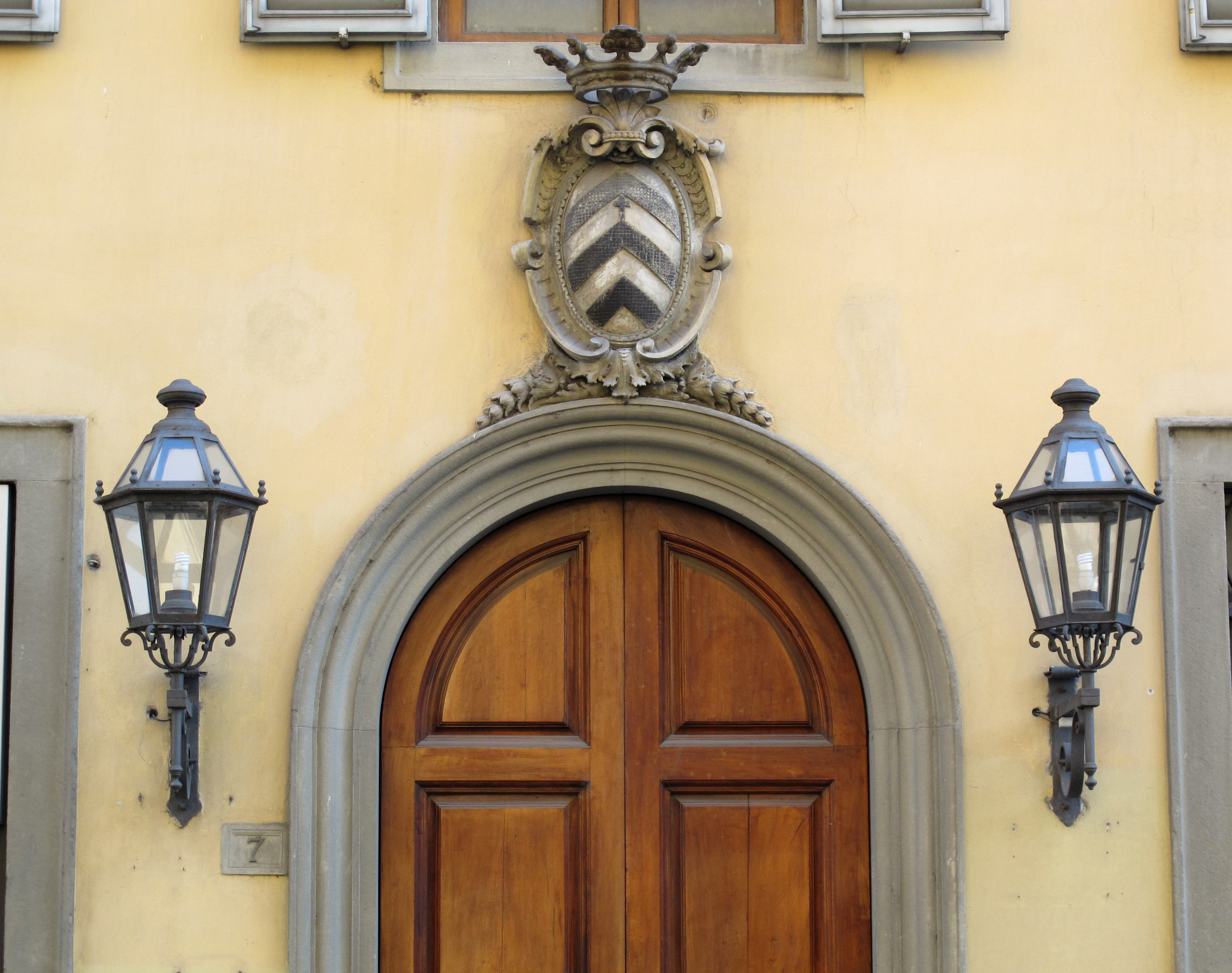 Corso tintori 7, palazzo jennings riccioli